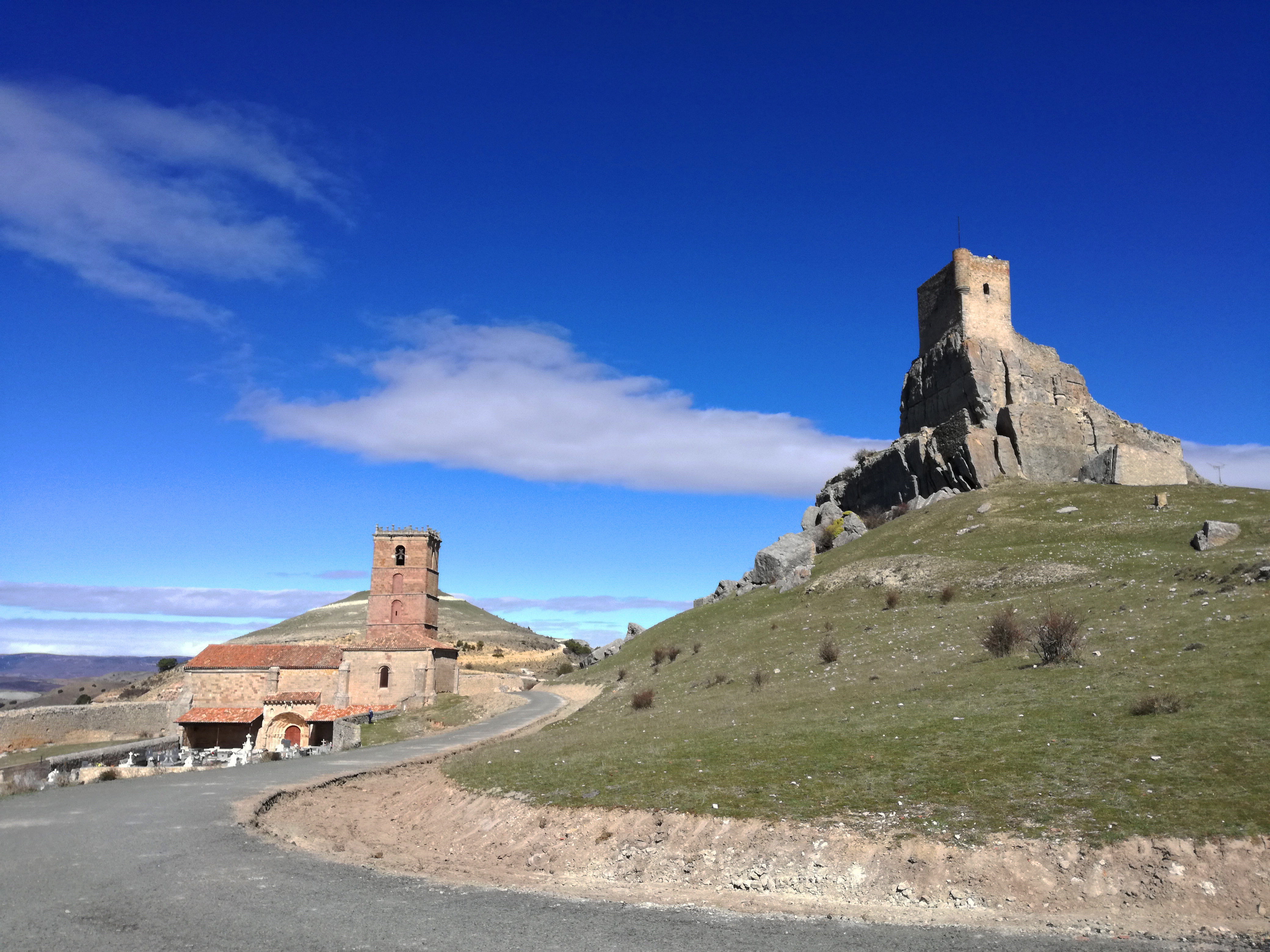 A la izquierda, la iglesia Santa María del Rey; a la derecha, el castillo de Atienza.